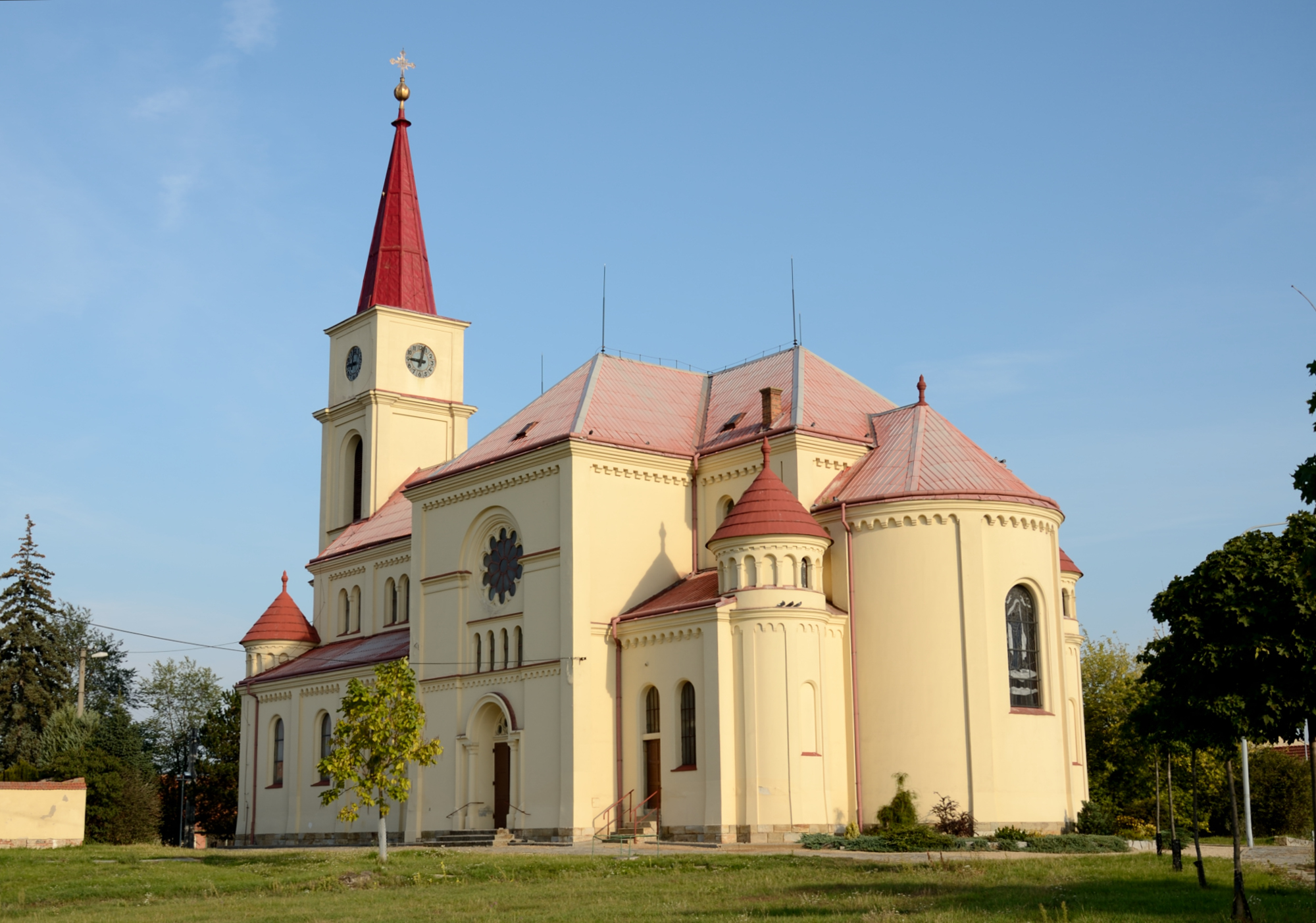 Kostel Všech svatých (Ořechov), Ořechov